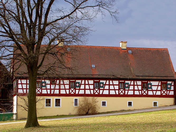 Egerländer Fachwerkhaus in Neualbenreuth Fotograf: Walter J.Pilsak Copyright Status: GNU Freie Dokumentationslizenz